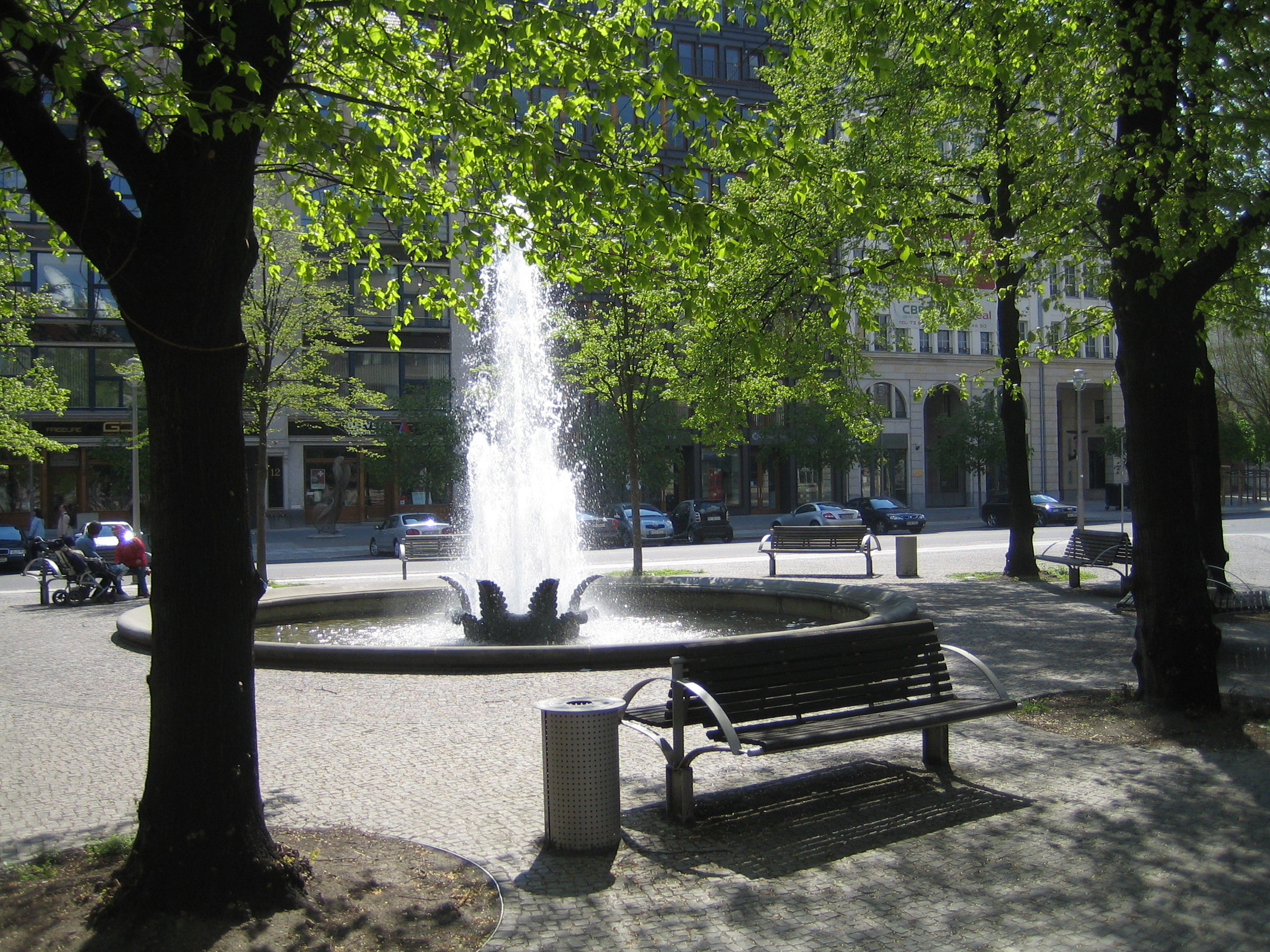 The Hausvogteiplatz in Berlin